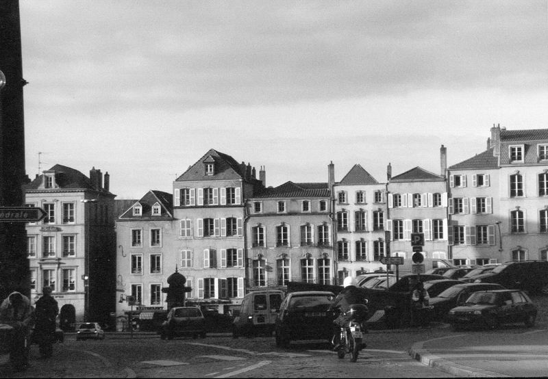 eigene Aufnahme GNU FDL